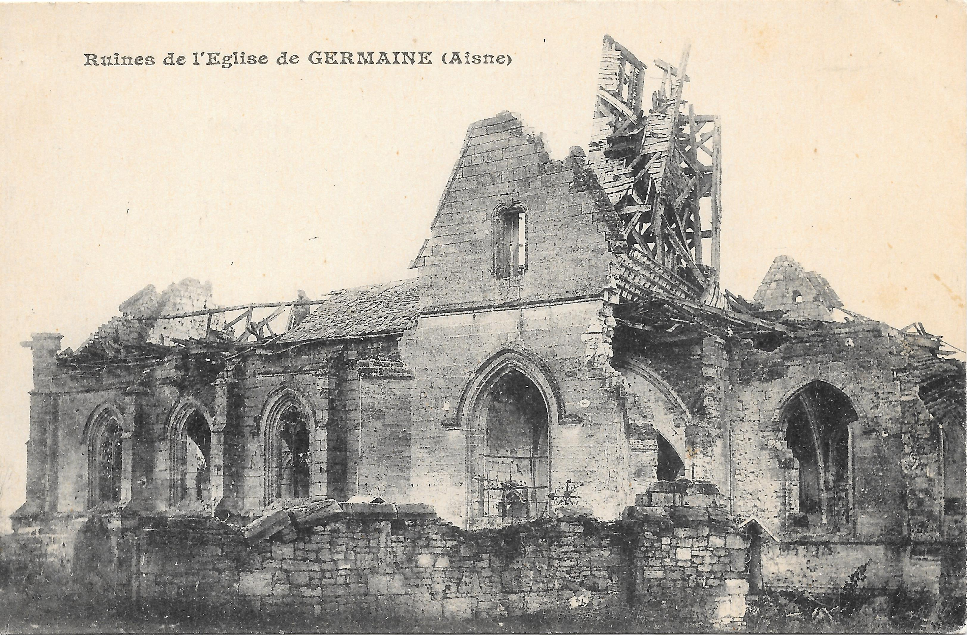 Carte postale de l'église détruite par les Allemands en février 1917.